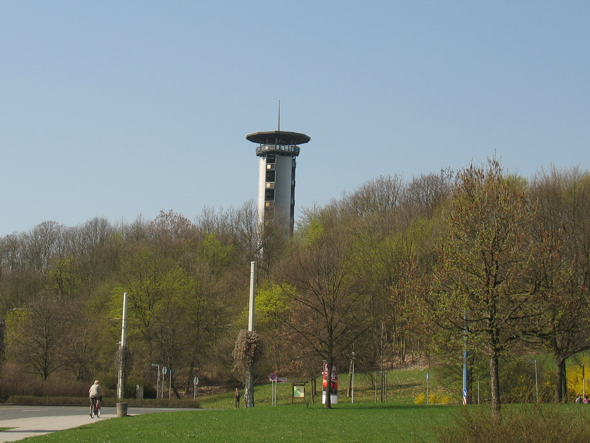 Plauen, der 1997 eingeweihte Bärensteinturm in der Nähe des Oberen Bahnhofs